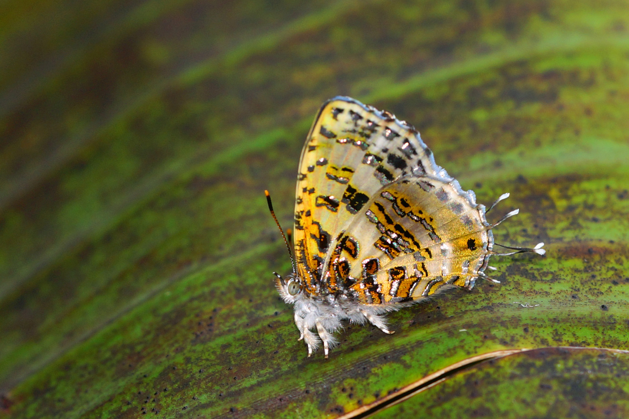 三尾灰蝶 Catapaecilma major moltrechti